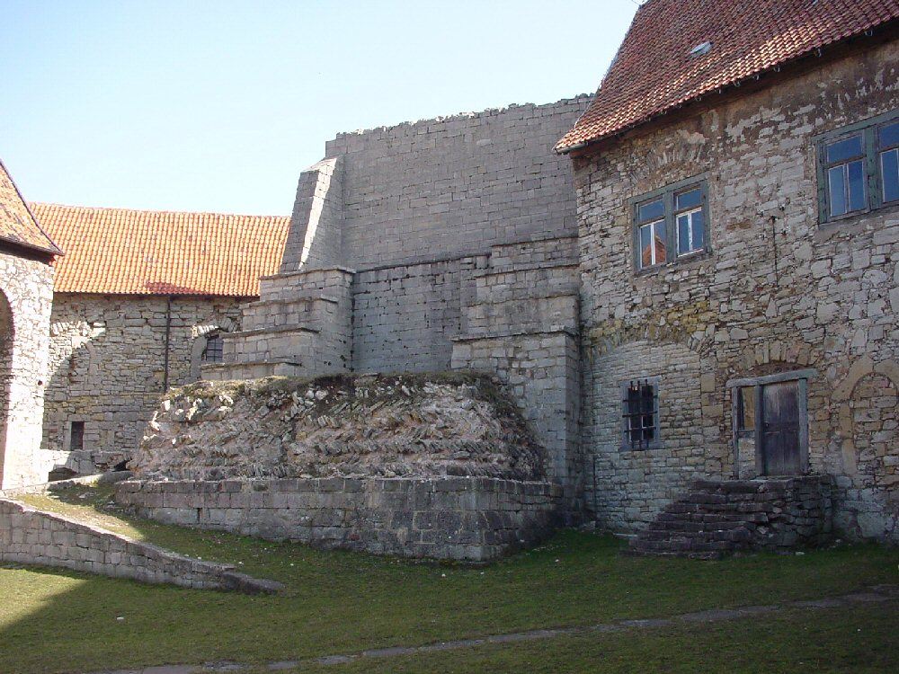 eigenes Foto von 2004, Public Domain Stumpf des Bergfriedes, Mewes 07:03, 14. Apr 2005 (CEST)